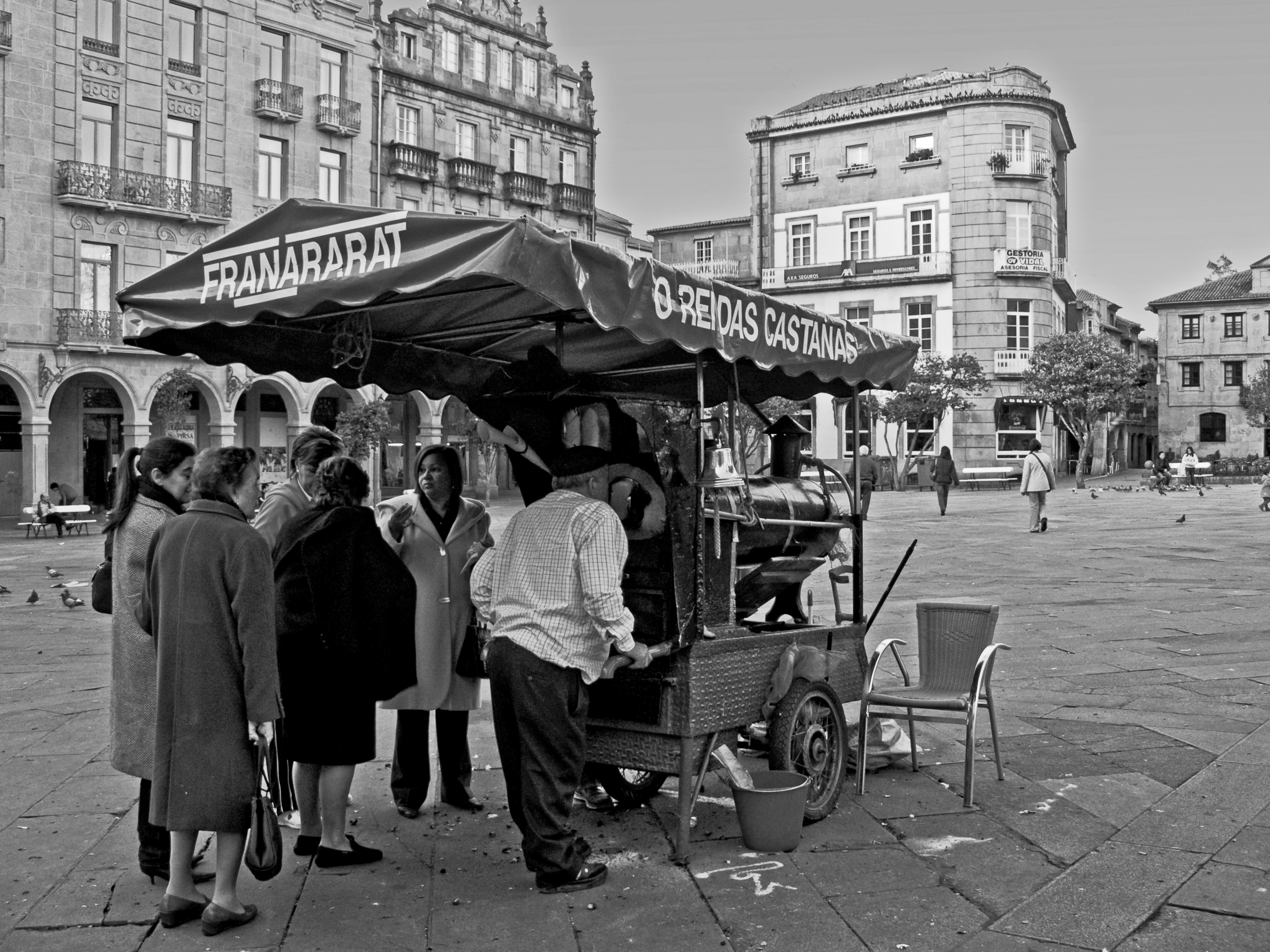 Castañeiro, praza da Herrería, Pontevedra